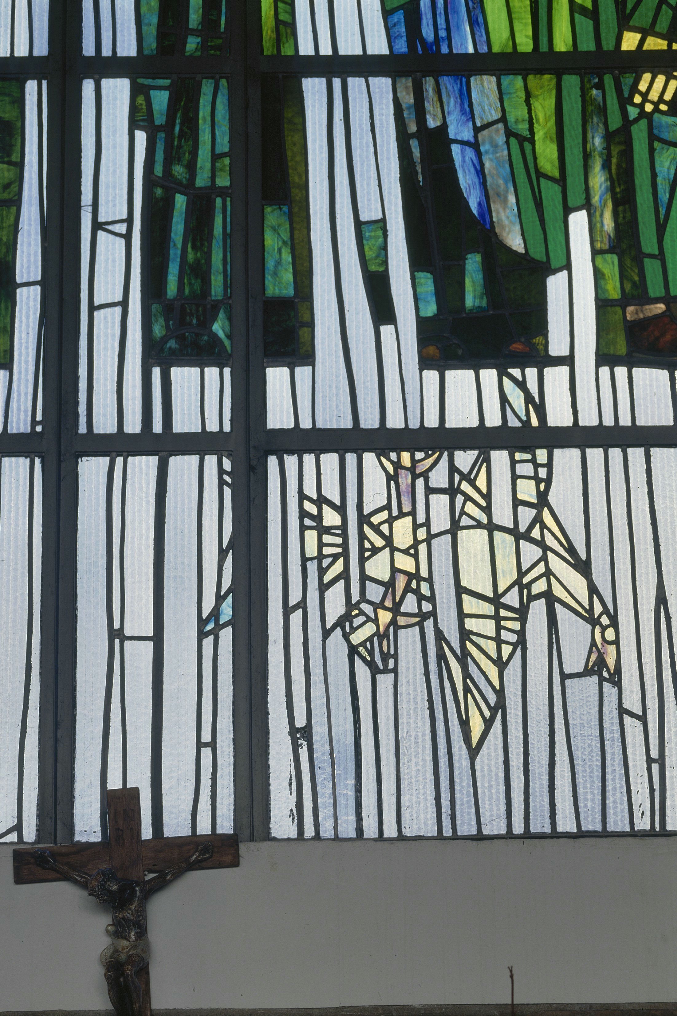 Sint Jozefkerk: Interieur, detail glas-in-loodraam (opmerking: Gefotografeerd voor Glas in lood in Nederland 1817-1968)